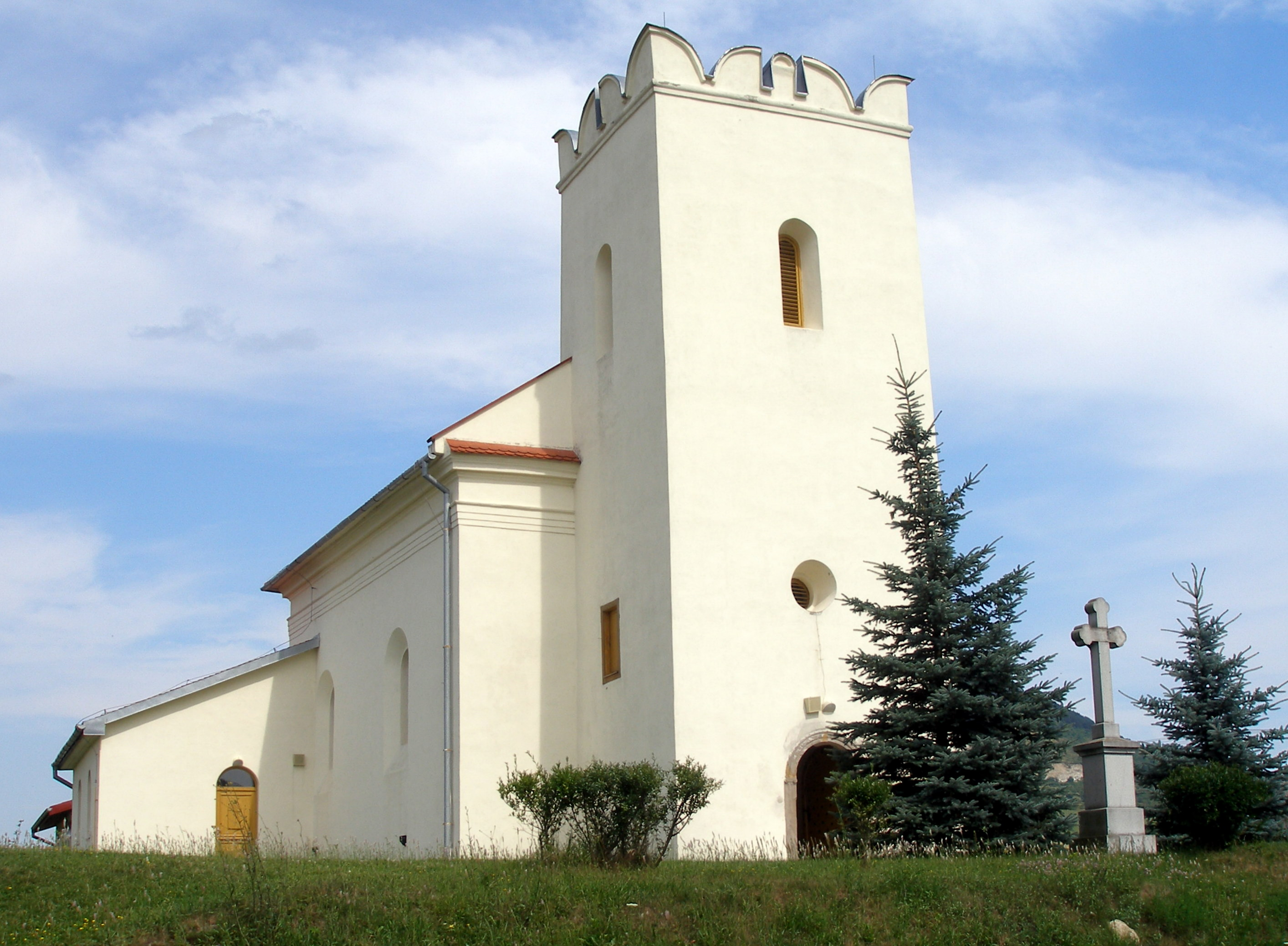 Kostol v obci Hubošovce okres Sabinov, región Šariš This medium shows the protected monument with the number 708-296/0 (other) in the Slovak Republic.